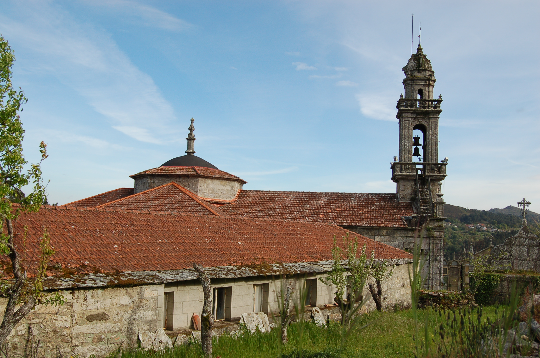 Igrexa parroquial de San Miguel de Albarellos, no concello de Boborás